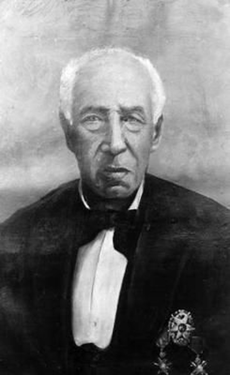 Joaquim José de Mendanha